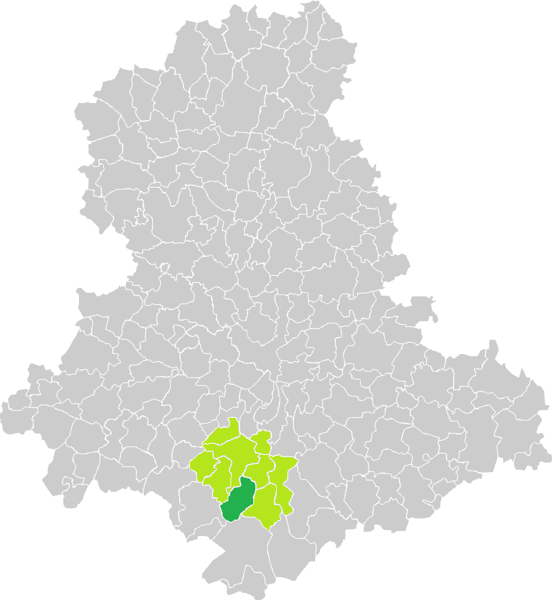 Carte de situation de la commune de La Meyze (en vert foncé) dans le votre Canton (en vert clair) sur une carte des communes de la Haute-Vienne